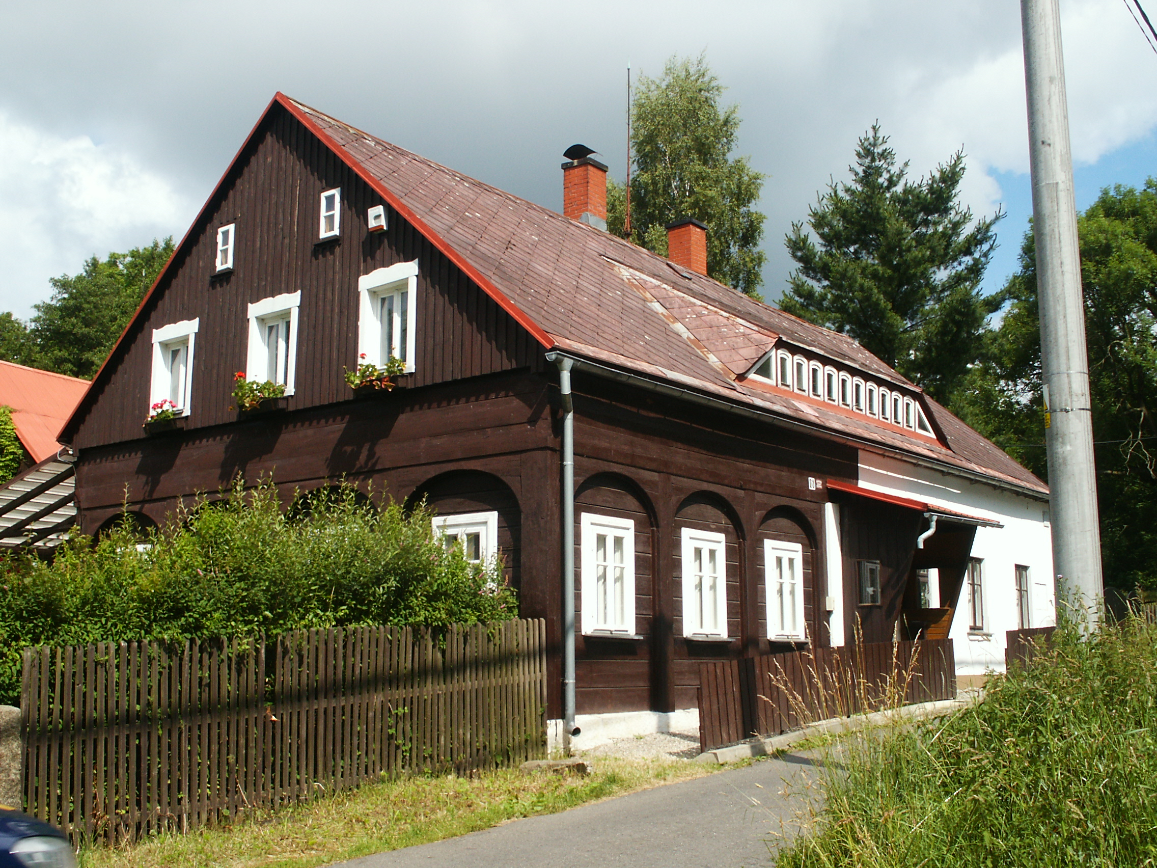 Žofín - kozí farma (č.p. 6)